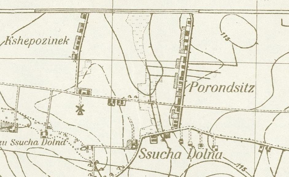 Parądzice na niemieckiej mapie wojskowej z okresu okupacji w 1944 r.